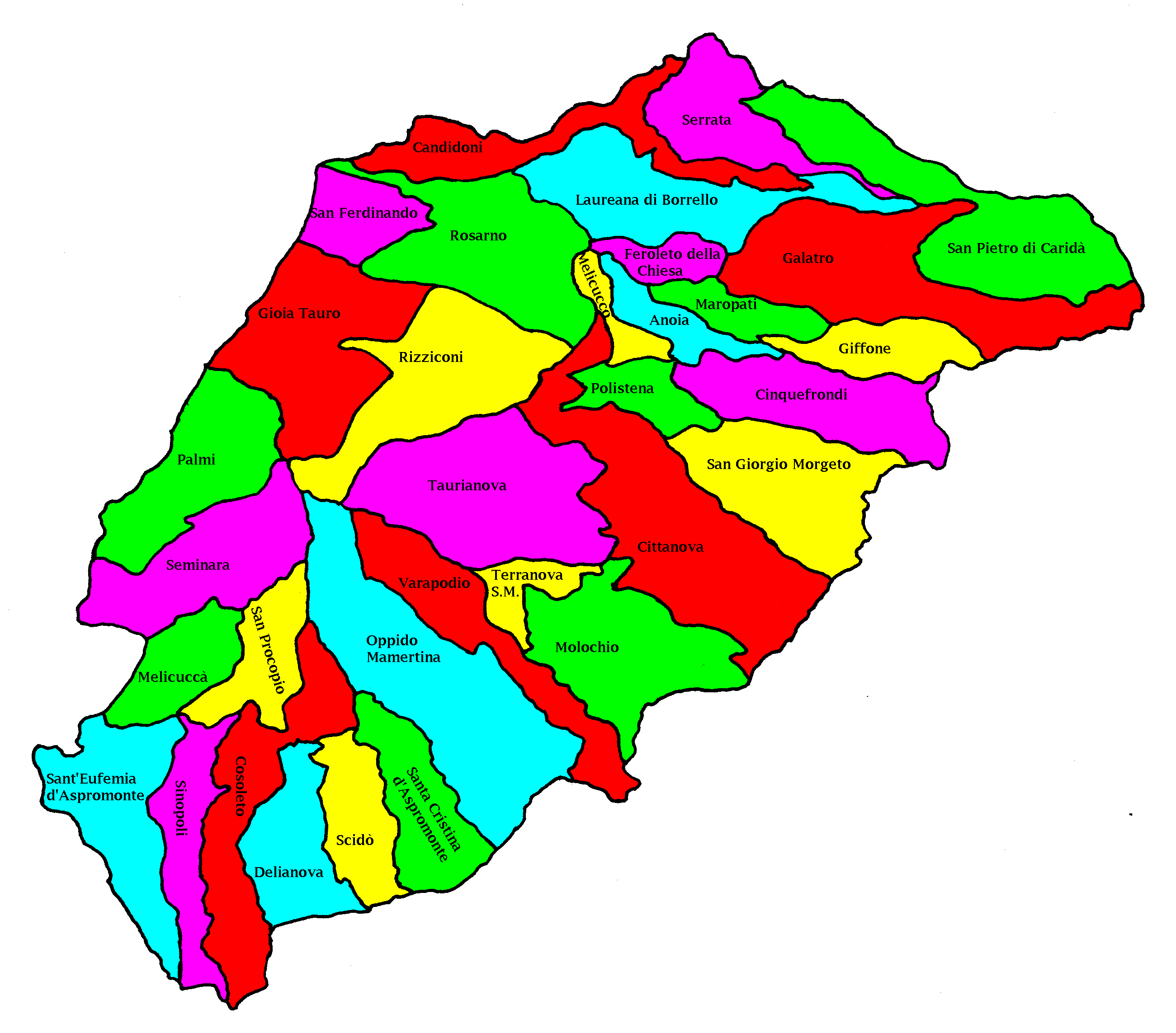 Mappa dei comuni della piana di Gioia Tauro - Colore